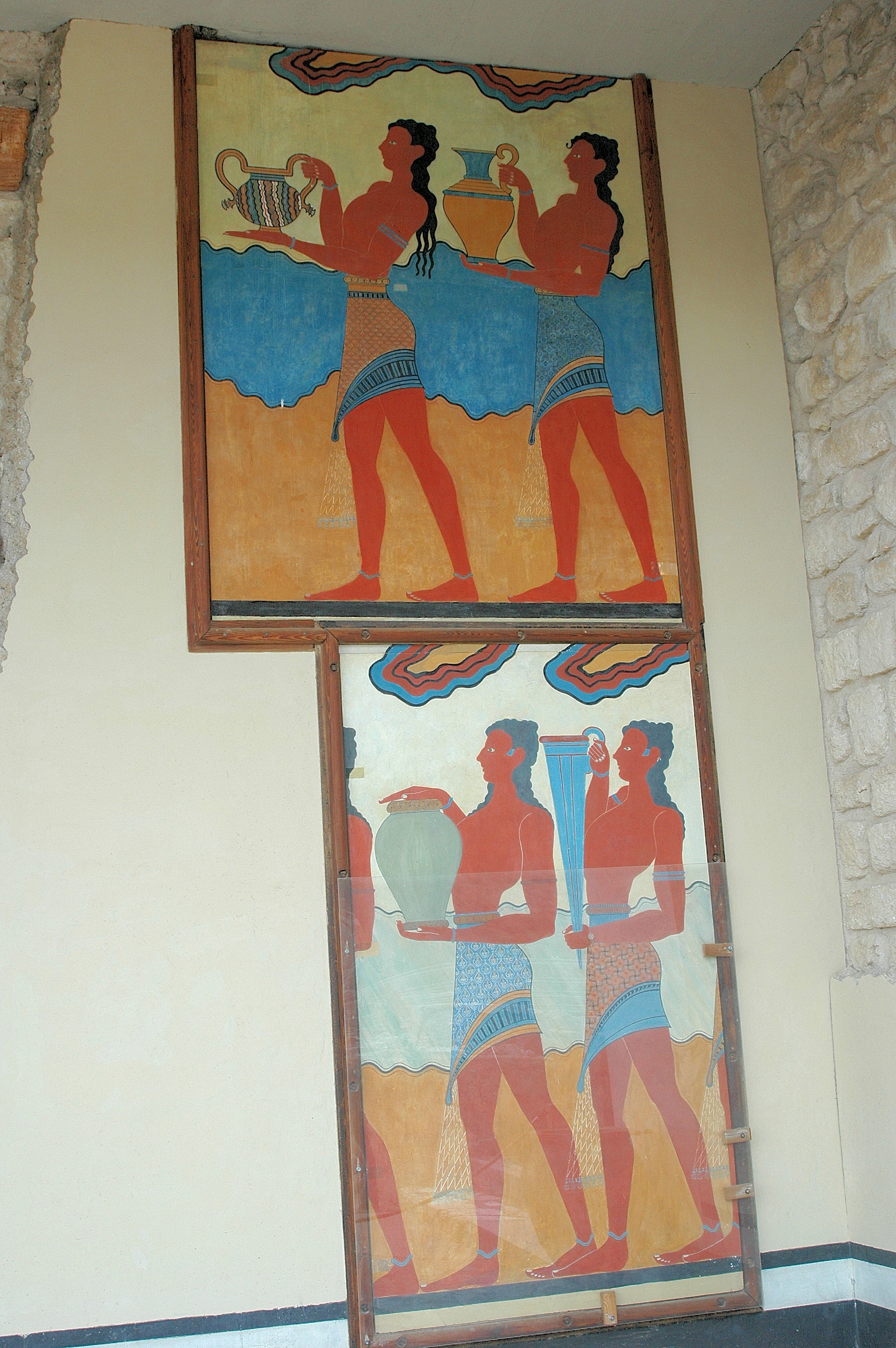 Knossos fresques 1. Photo prise par Harrieta171 le 28/01/06